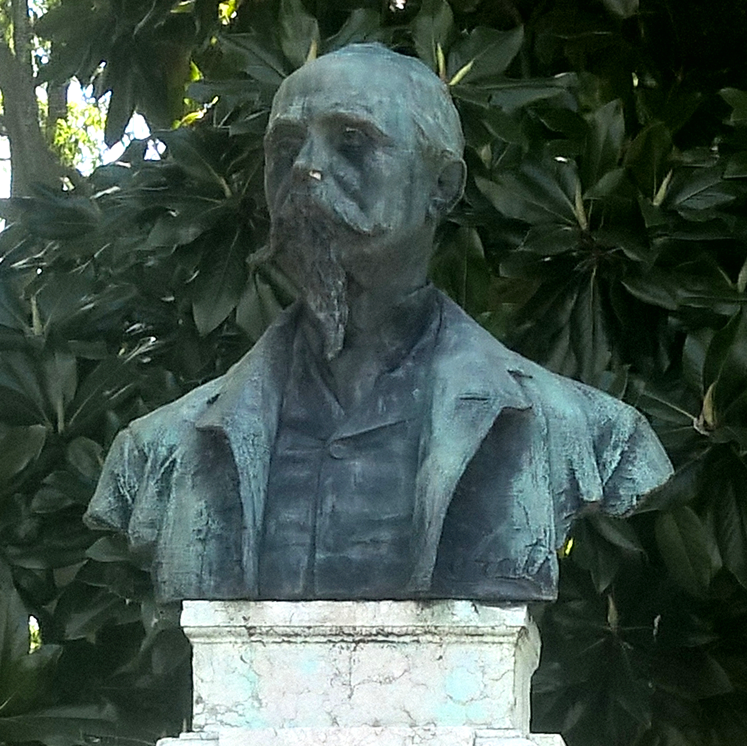 La foto riproduce Giuseppe Grioli, protagonista del Risorgimento italiano, fratelli di Giovanni, il primo dei Martiri di Belfiore. Il busto commemorativo è stato eretto nei Giardini Nuvolari di Mantova.